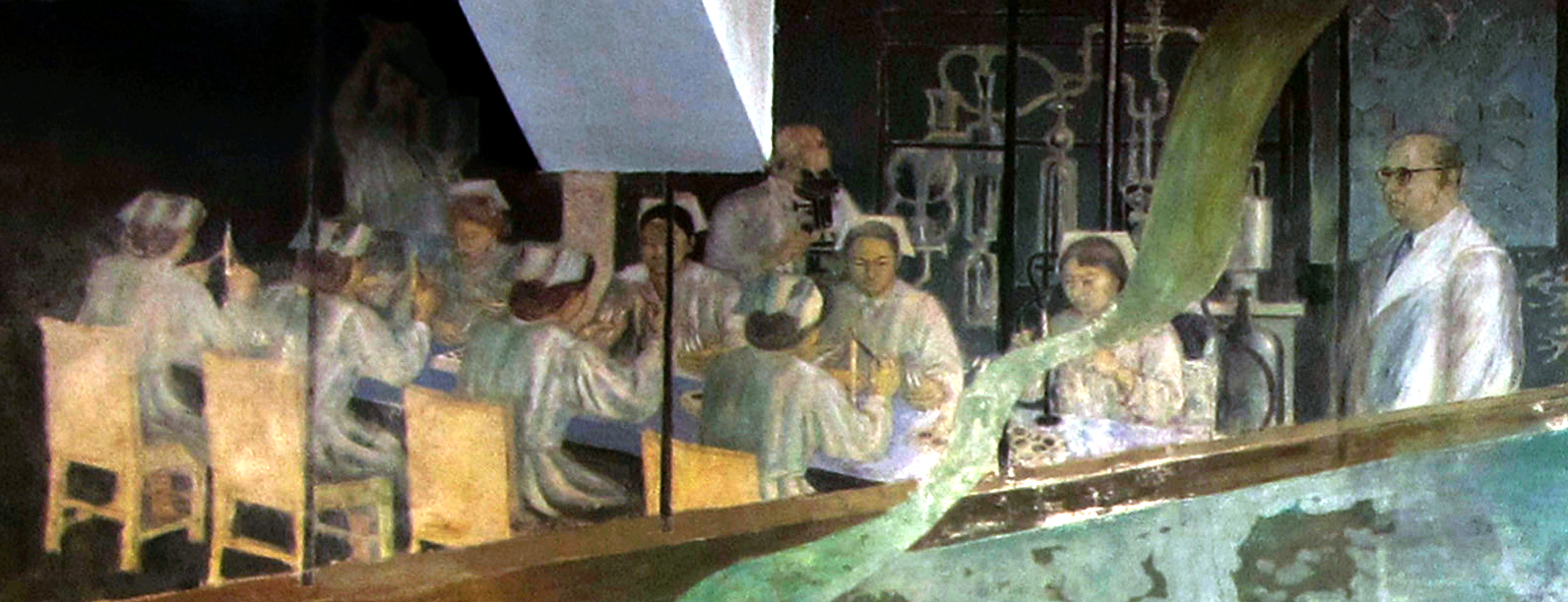 Daniel Belmar (derecha) retratado en el mural "Historia de la medicina y la farmacia en Chile" (Concepción, 1957-58), de Julio Escámez.